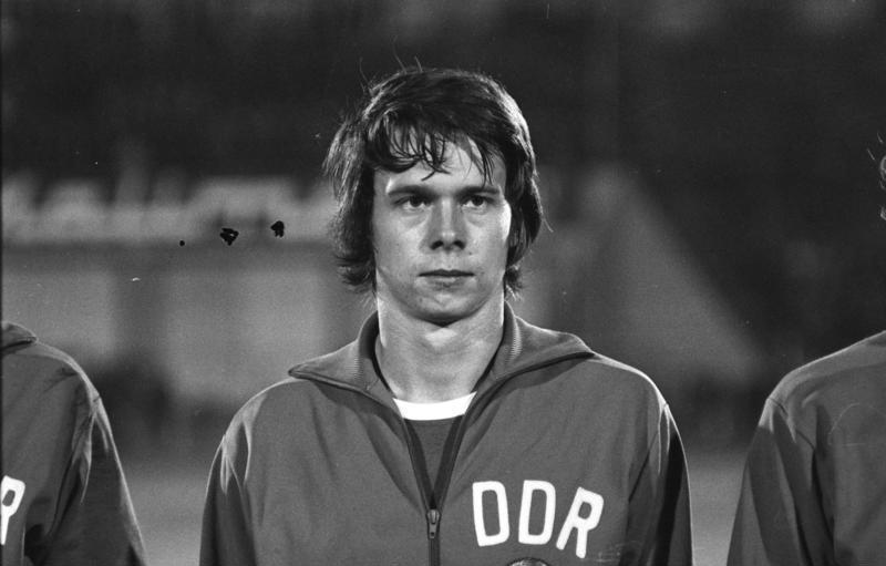 ADN-ZB / Mittelstädt / 22.10.73 Berlin: Spieler der DDR-Fußball-Nationalmannschaft Jürgen Sparwasser (1. FC Magdeburg, 25 Jahre, 25 Länderspiele).